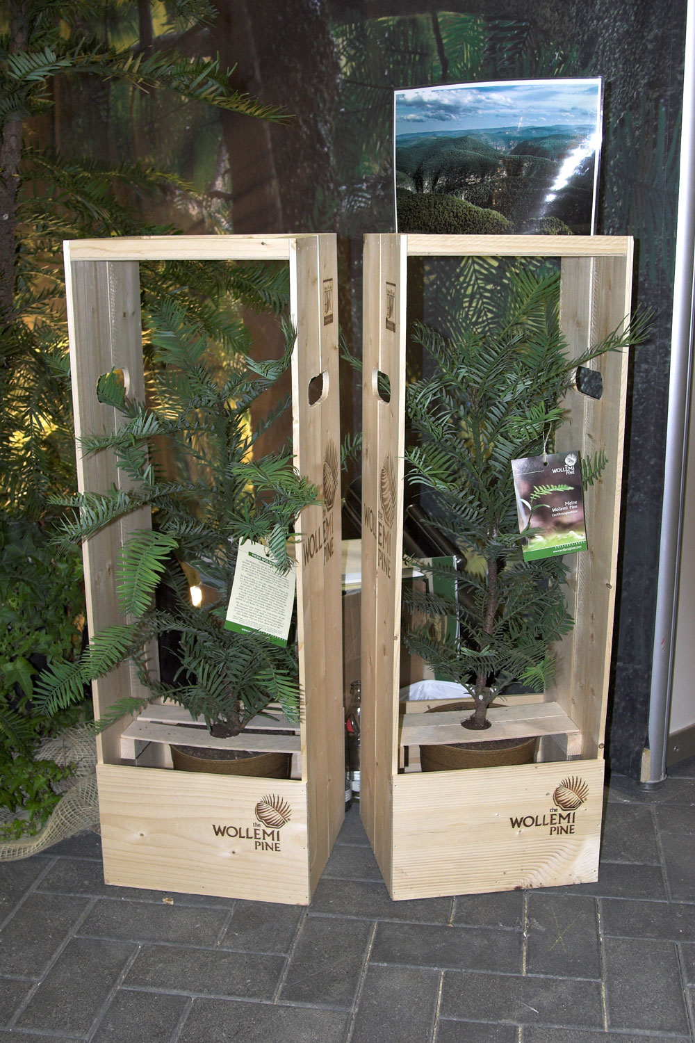 Vermarktung von Wollemia nobilis, Internationale Pflanzenmesse (IPM) 2007